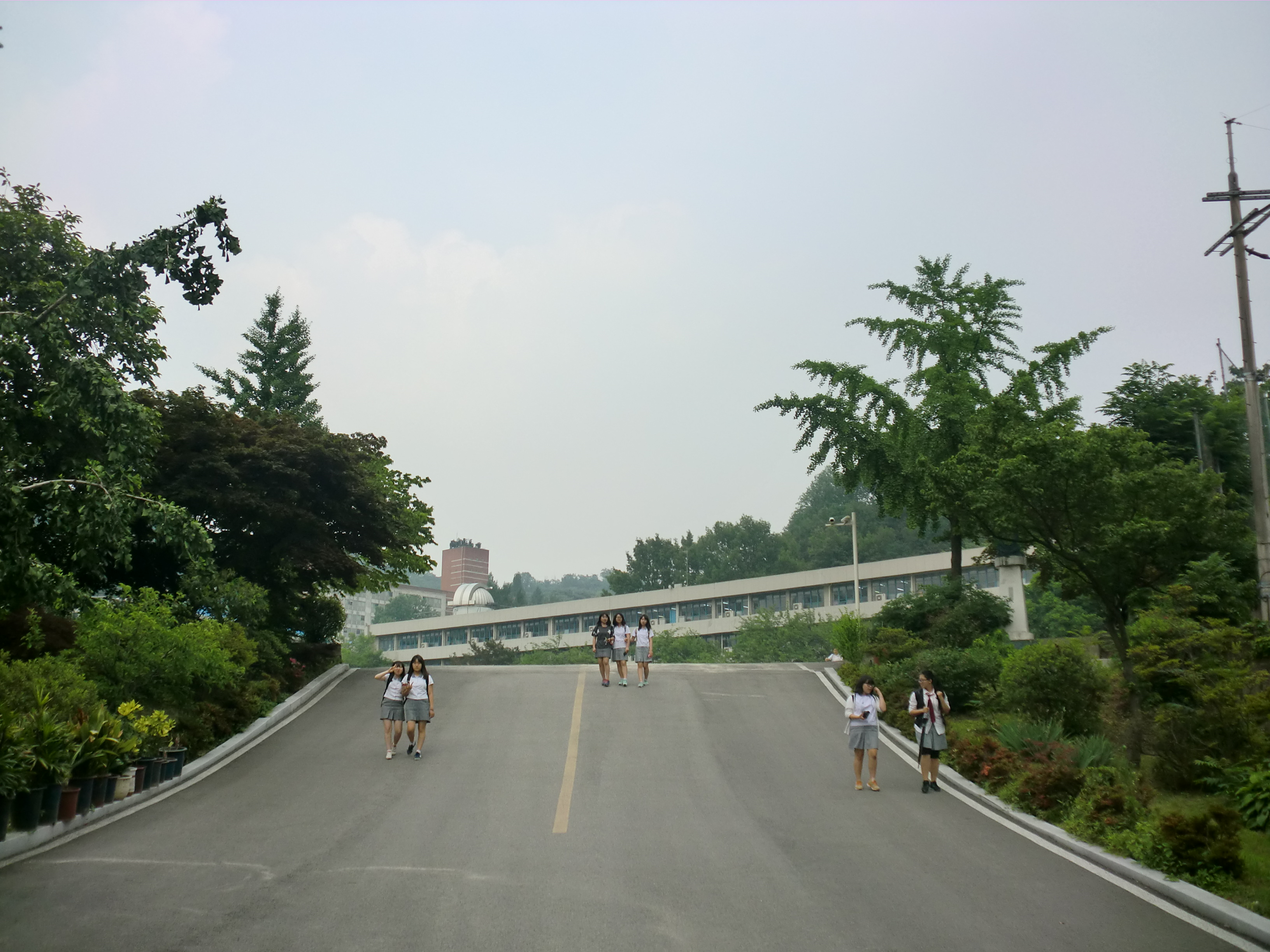 서울특별시 서대문구에 있는 한성화교중학